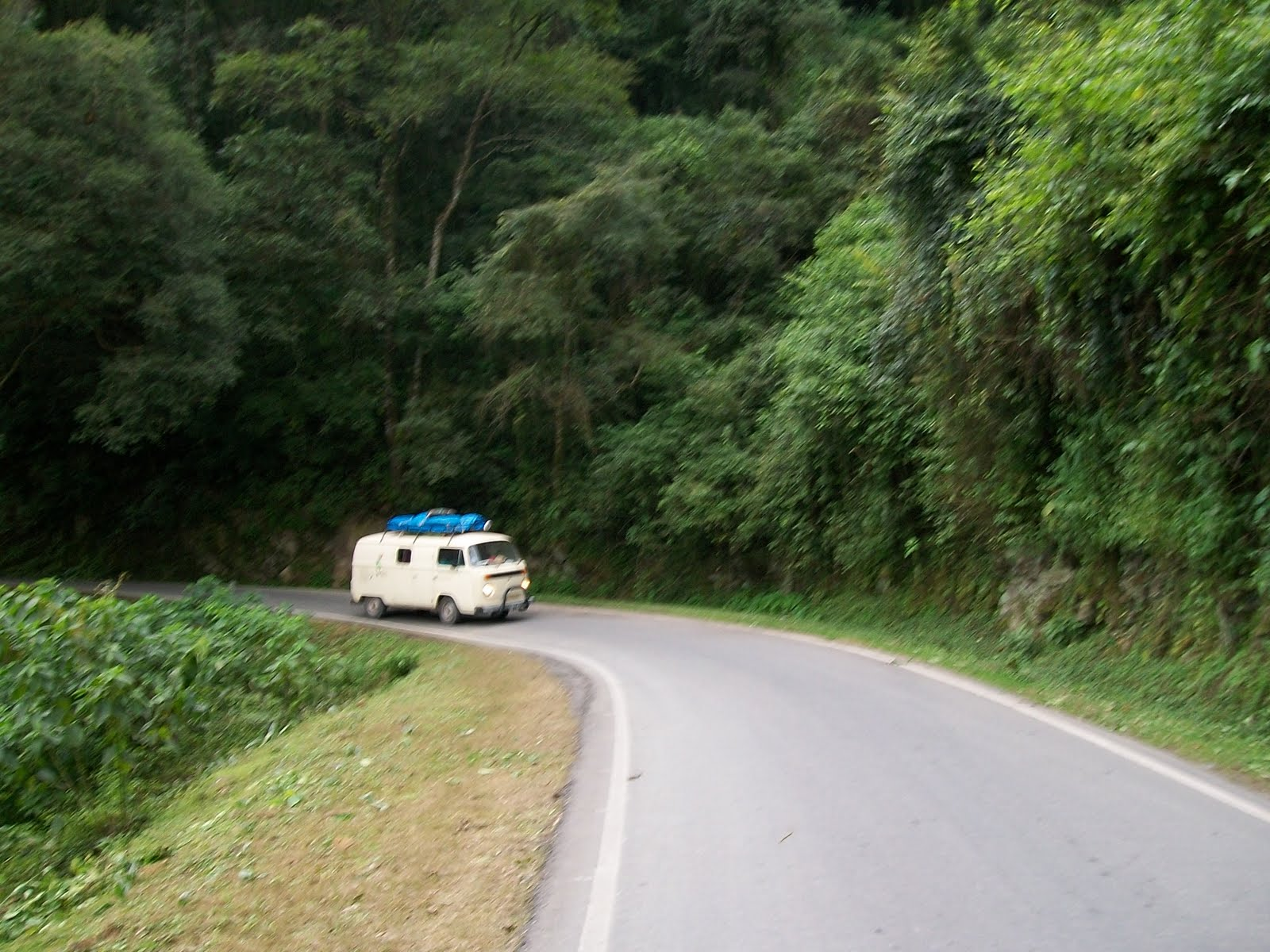 Ruta Nacional Nº9 (Camino de cornisa a través de las Yungas que une las capitales de Salta y Jujuy)